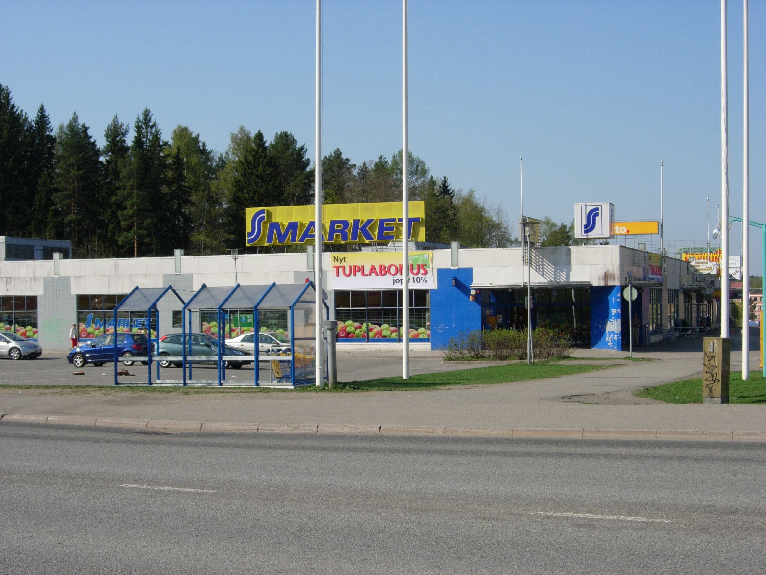 Koivulan ostoskeskus, Koivula, .